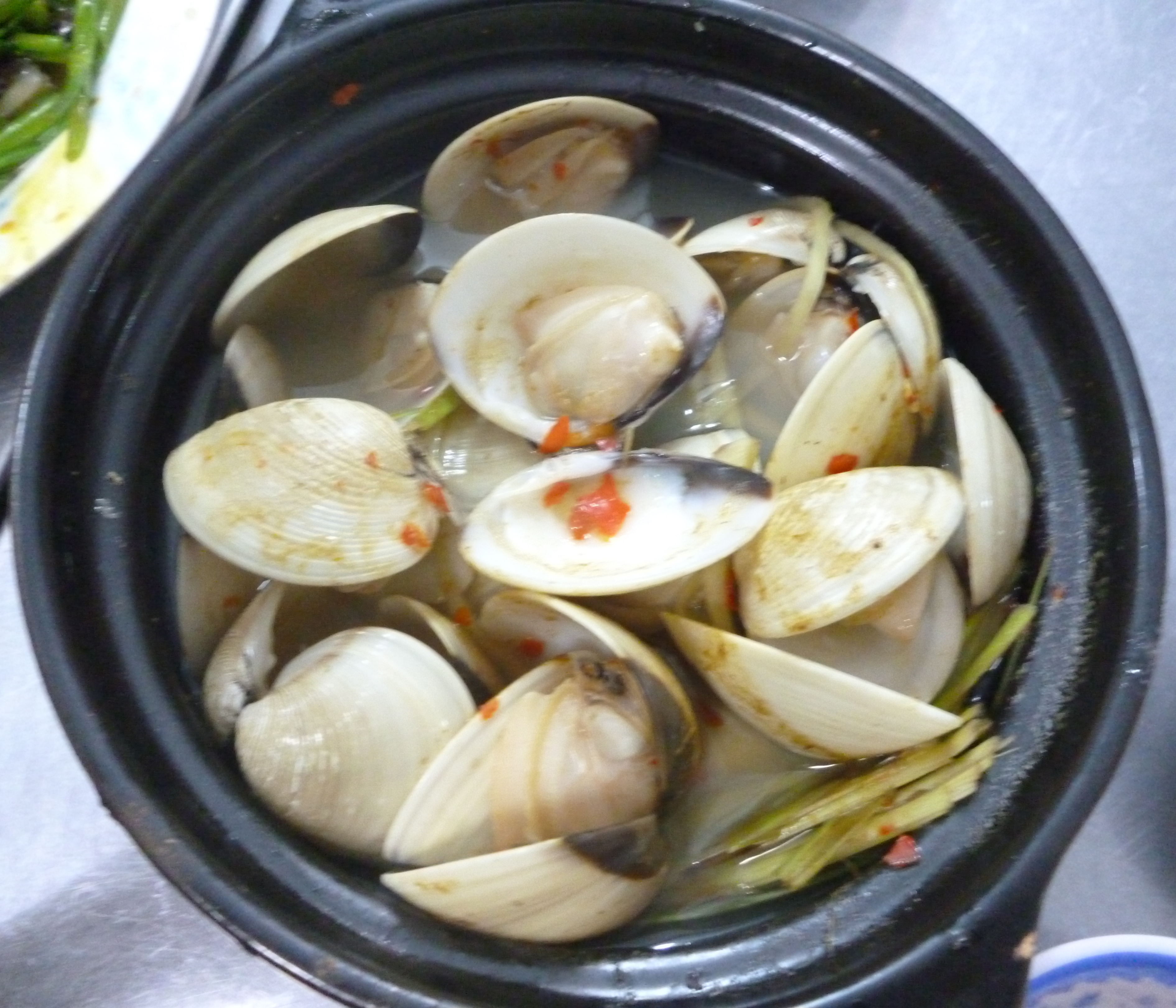 Hình chụp bằng máy ảnh cá nhân về dĩa ngao dầu bóng mỡ